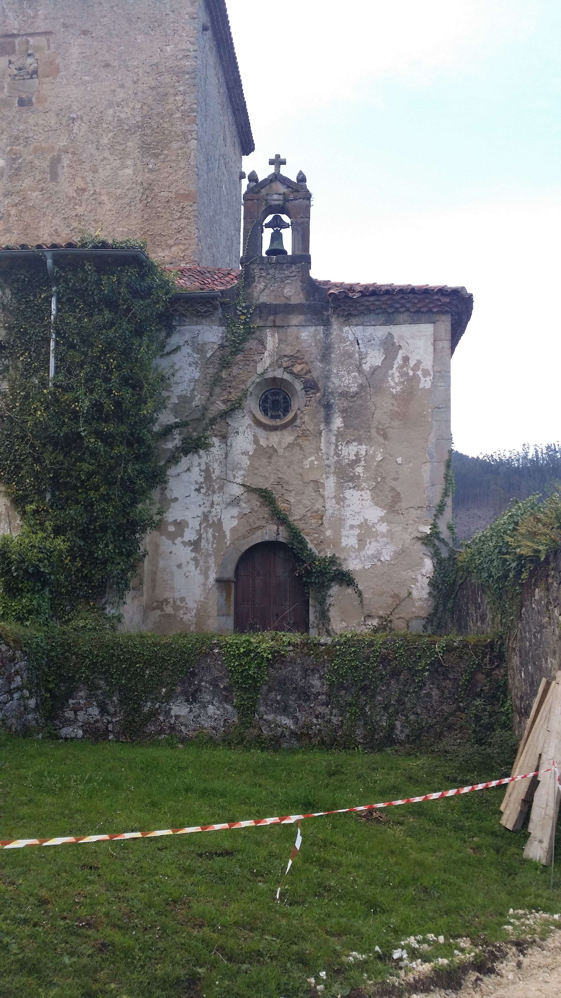 Parte delantera de la capilla de la Torre de Arango